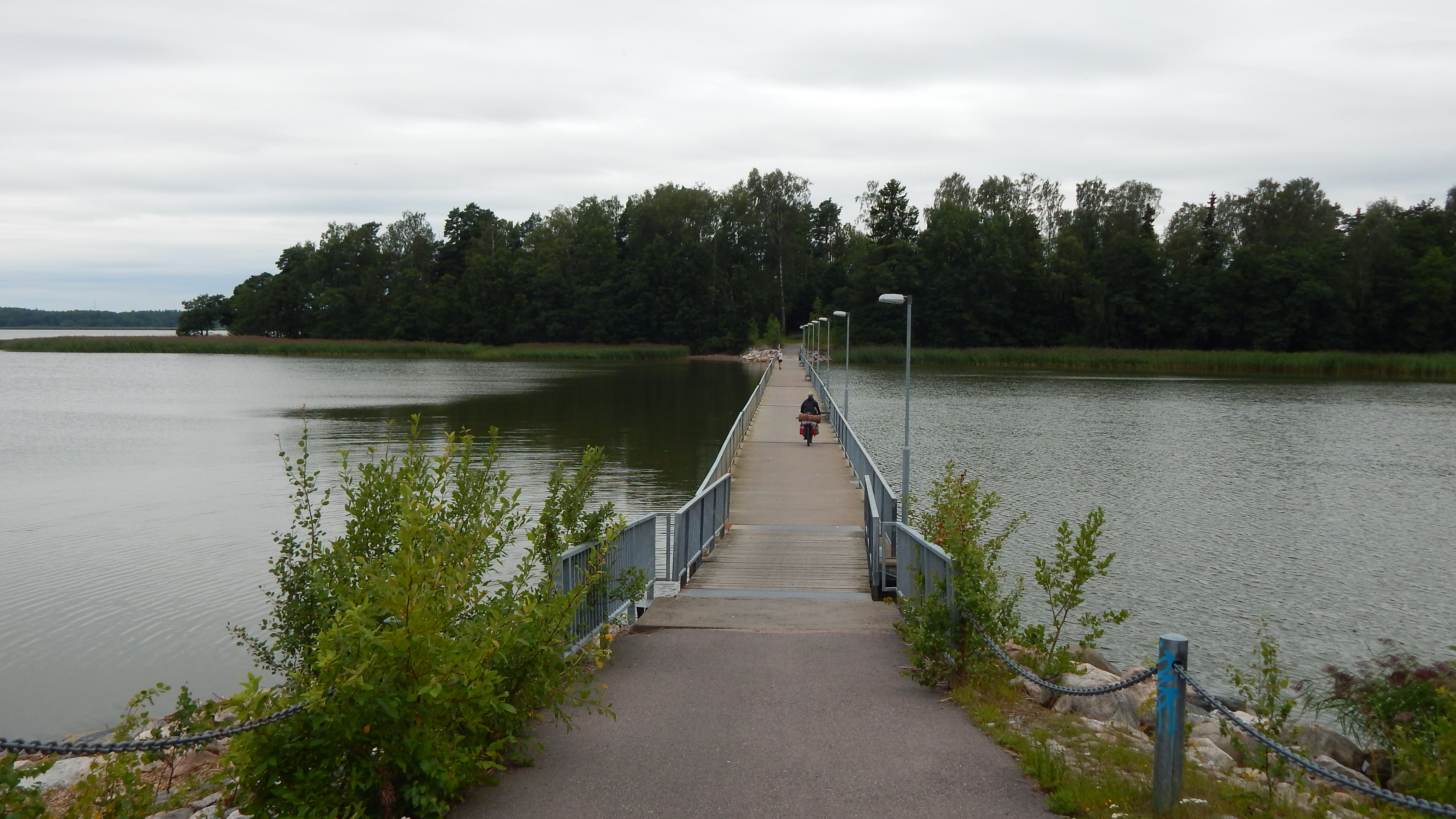 Пешеходный мост